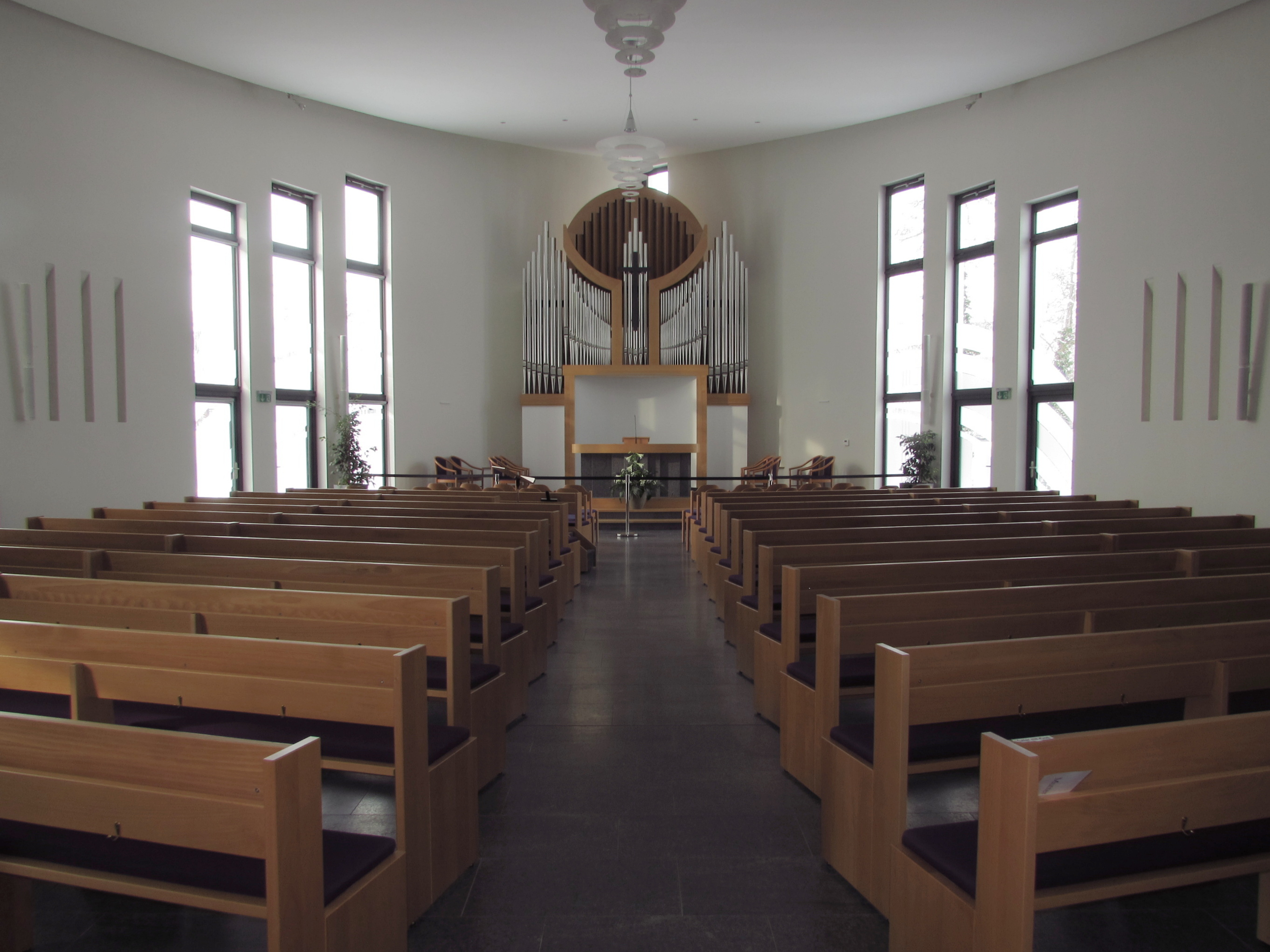 der kirchensaal der neuapostolischen kirche brandenburg